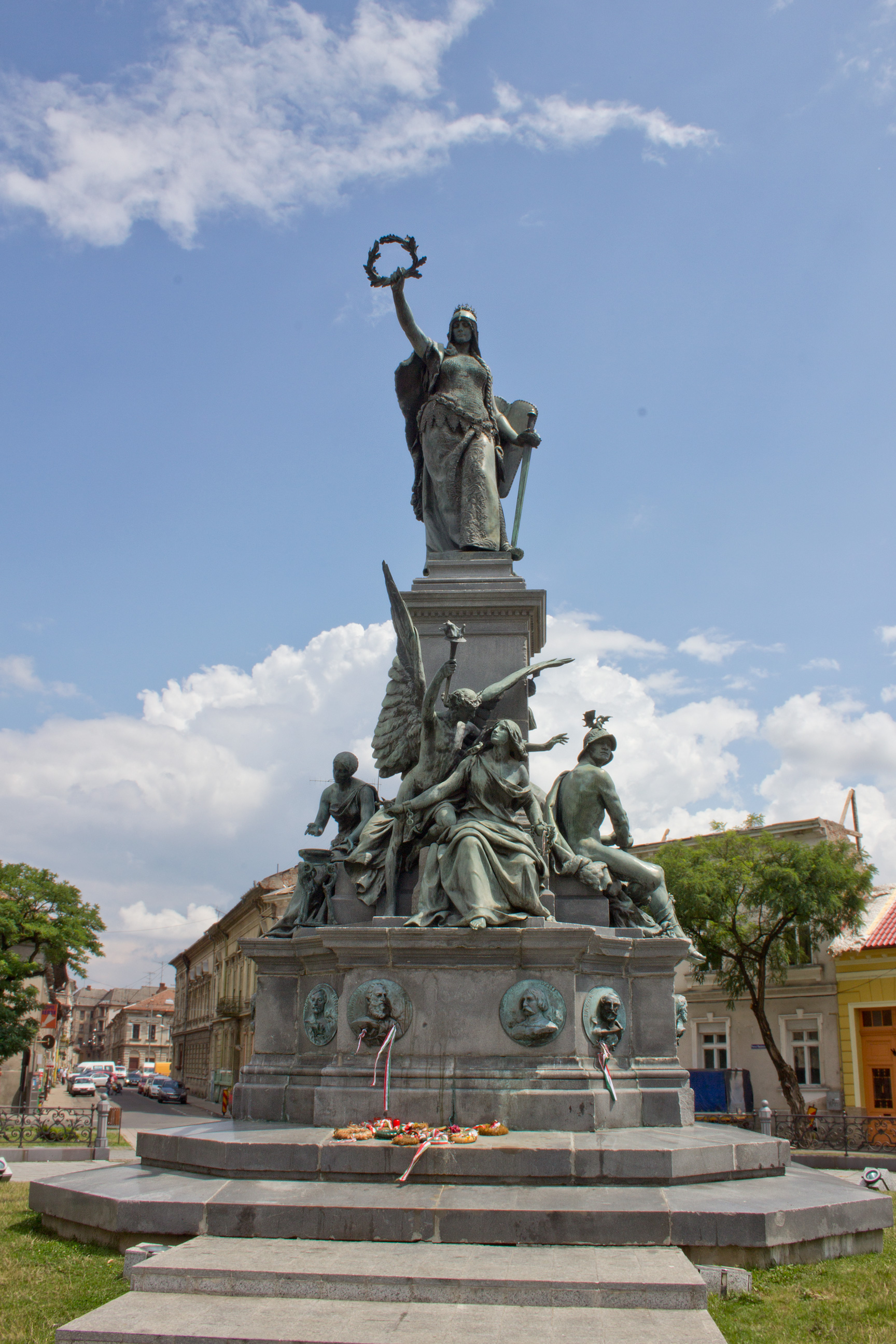 Freiheit-Denkmal auf dem Parcul Reconcilierii für die 13 Märtyrer, Stadt Arad (Rumänien). 02